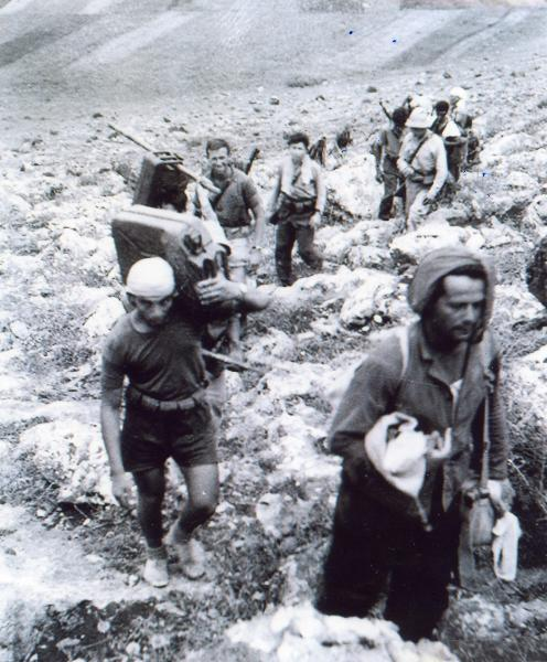 הגדוד הראשון של הפלמ"ח מטפס על רכס הרי נפתלי בדרכו לקרב מלכיה הראשון